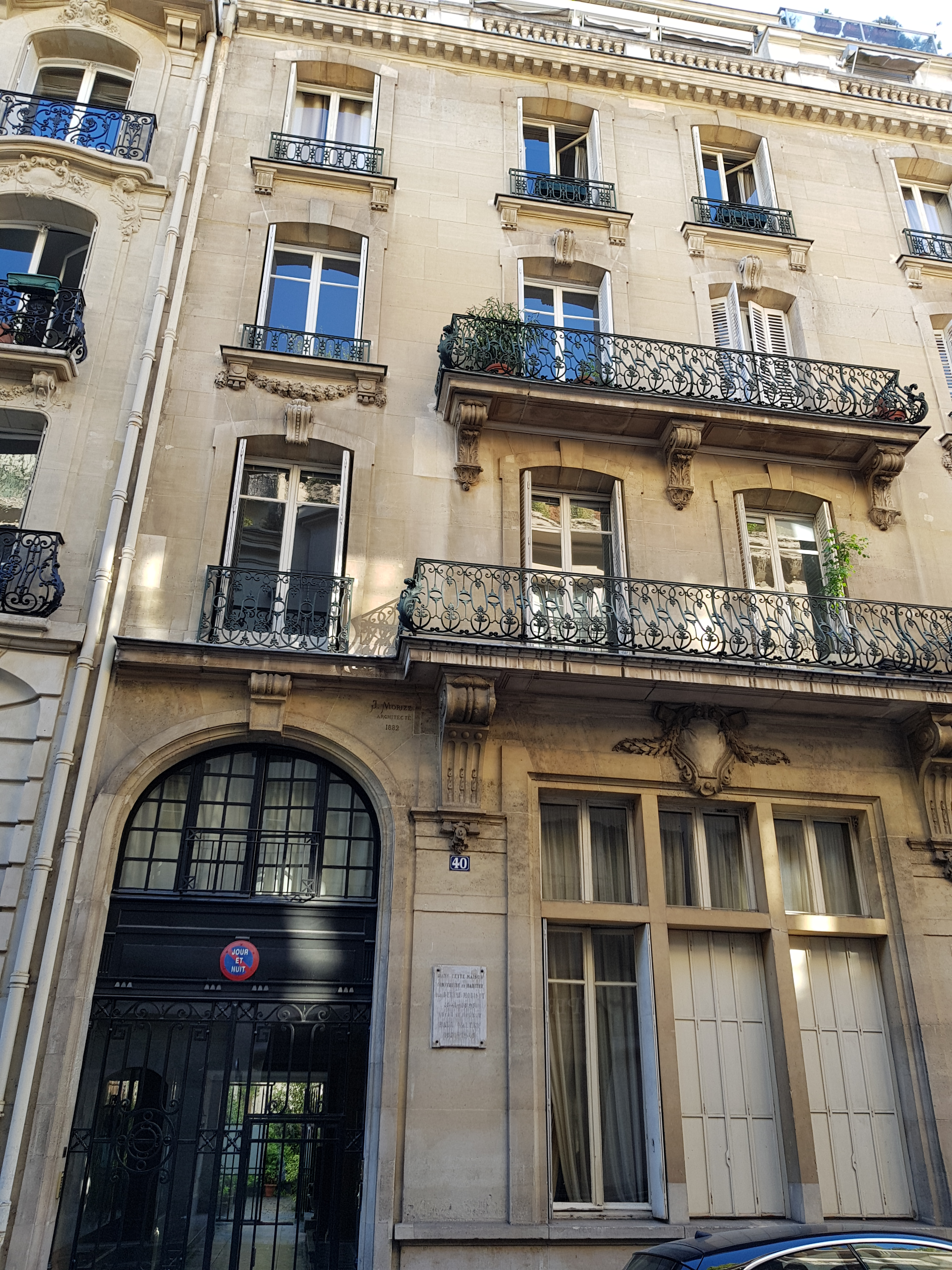 Immeuble du 40, rue Paul-Valéry, où Paul Valéry vécut de 1900 à 1945.